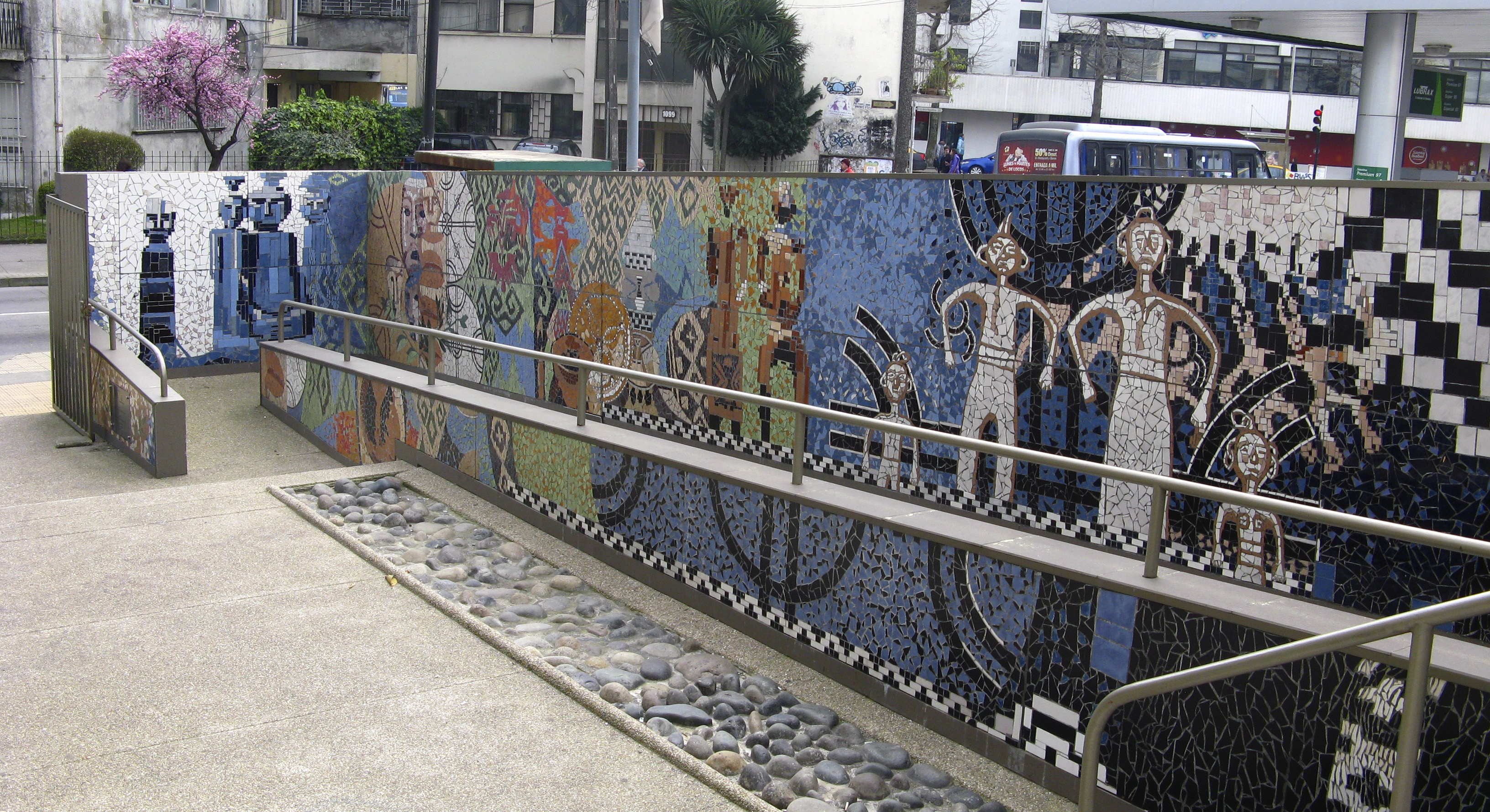 Mural "Educación: pasado, presente y futuro" (2009) de Marco Antonio Hernández Albarrán. Rampa de la parte exterior. Concepción, Chile. Agosto de 2012.